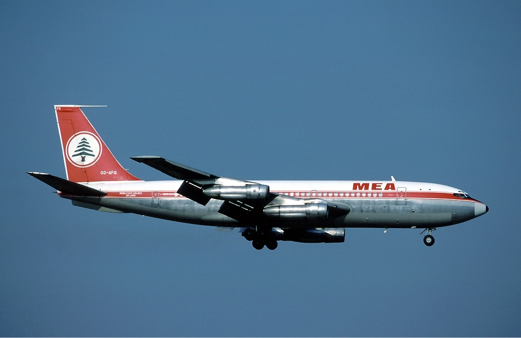 Middle East Airlines Boeing 720